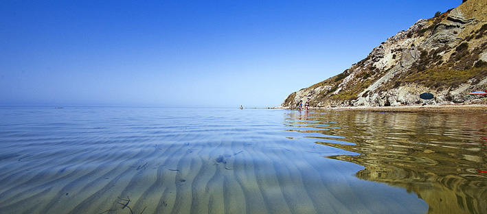 Siculiana | Agrigento | Sicily